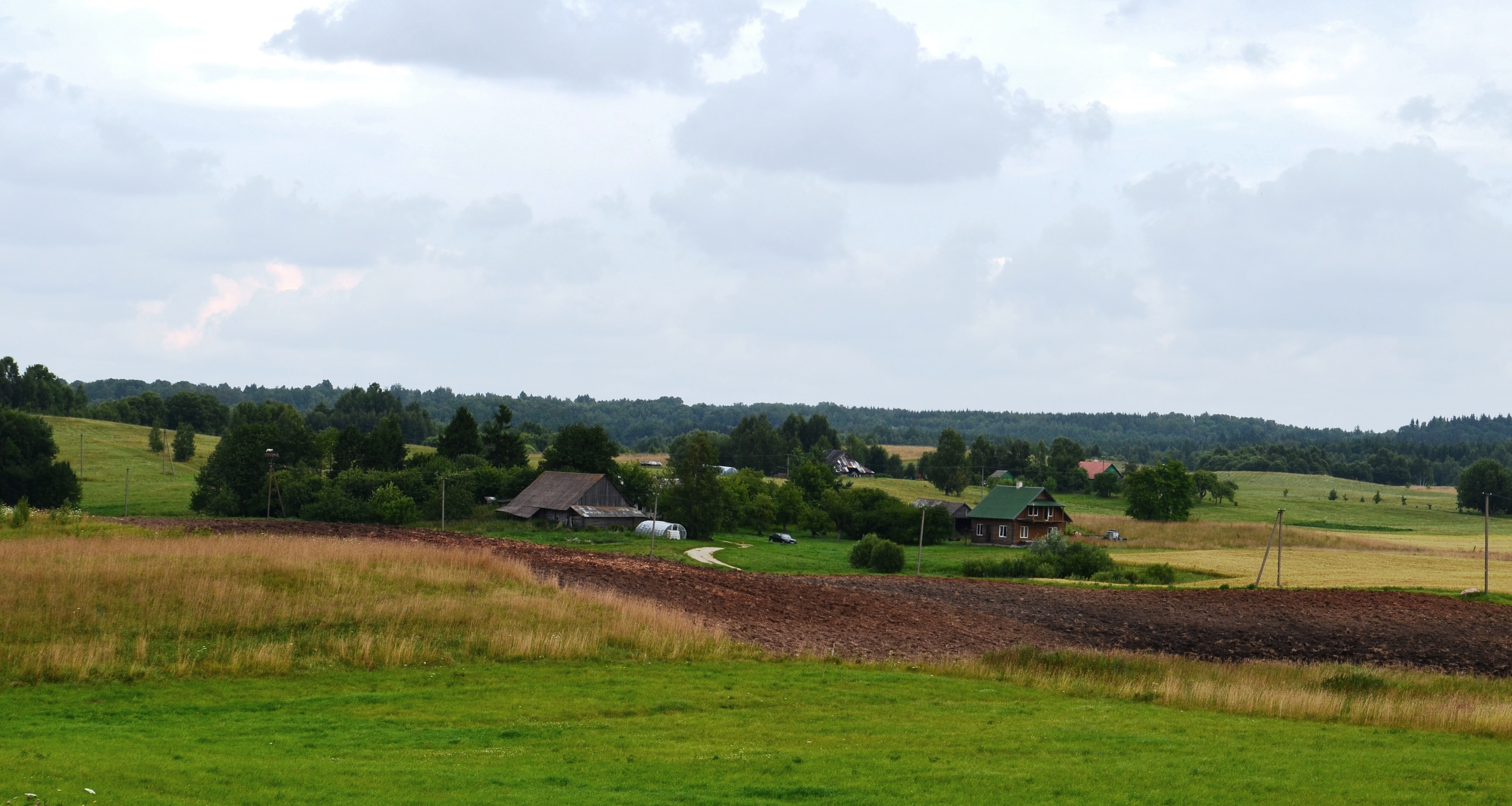 Šarkiškiai, Molėtų r.